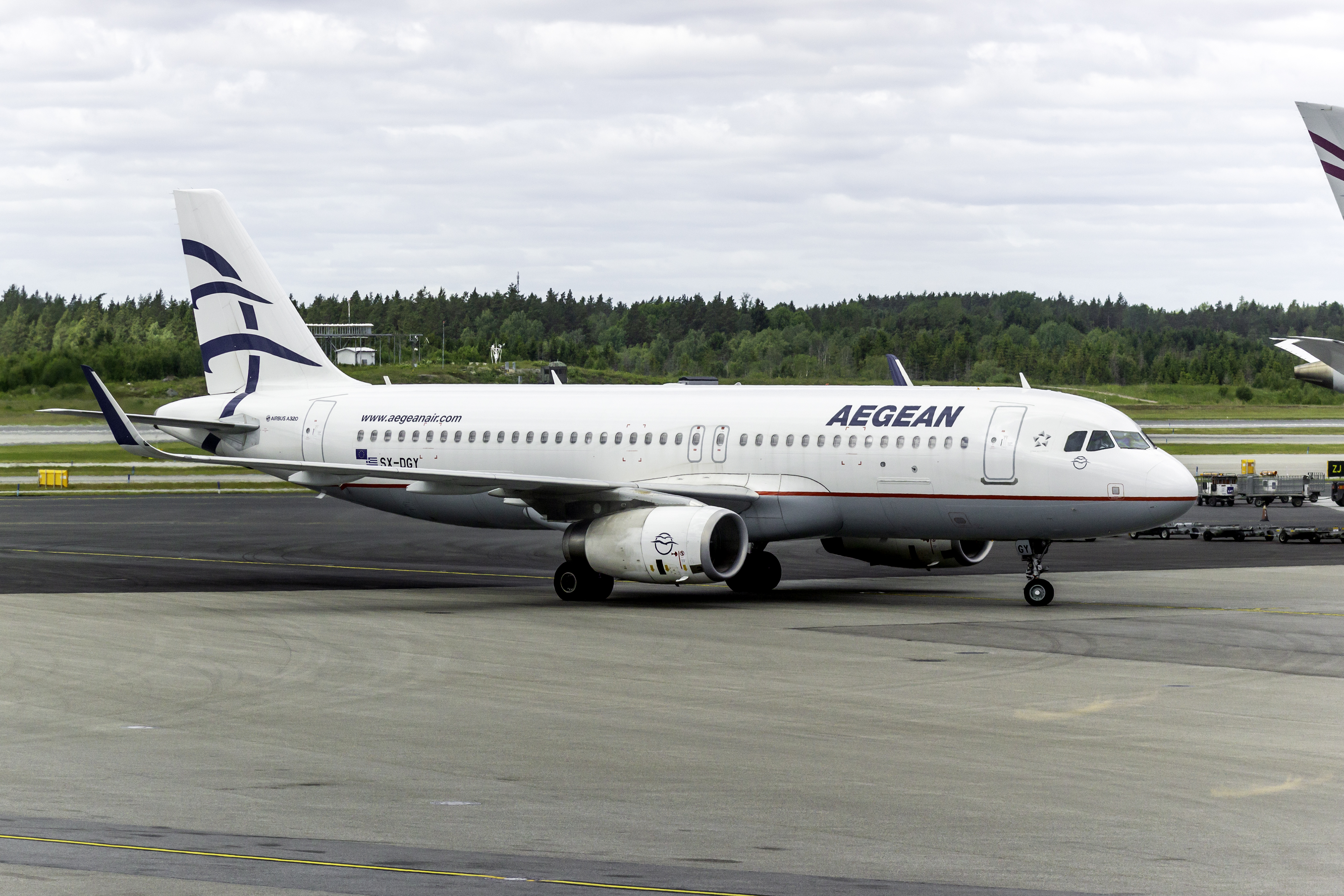 Airbus A320 de Aegean no aeroporto de Estocolmo-Arlanda.